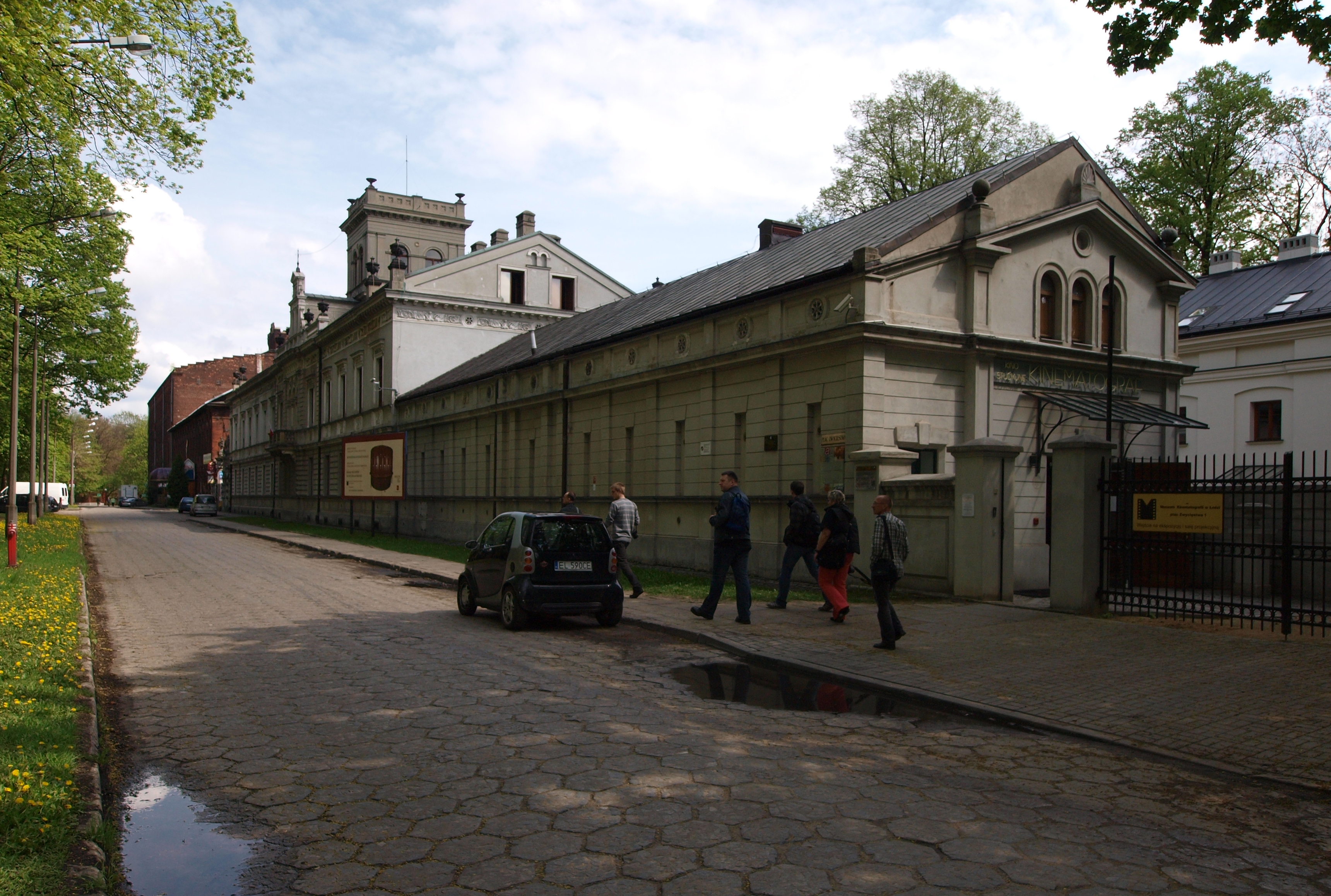 Plac Zwycięstwa w Łodzi.